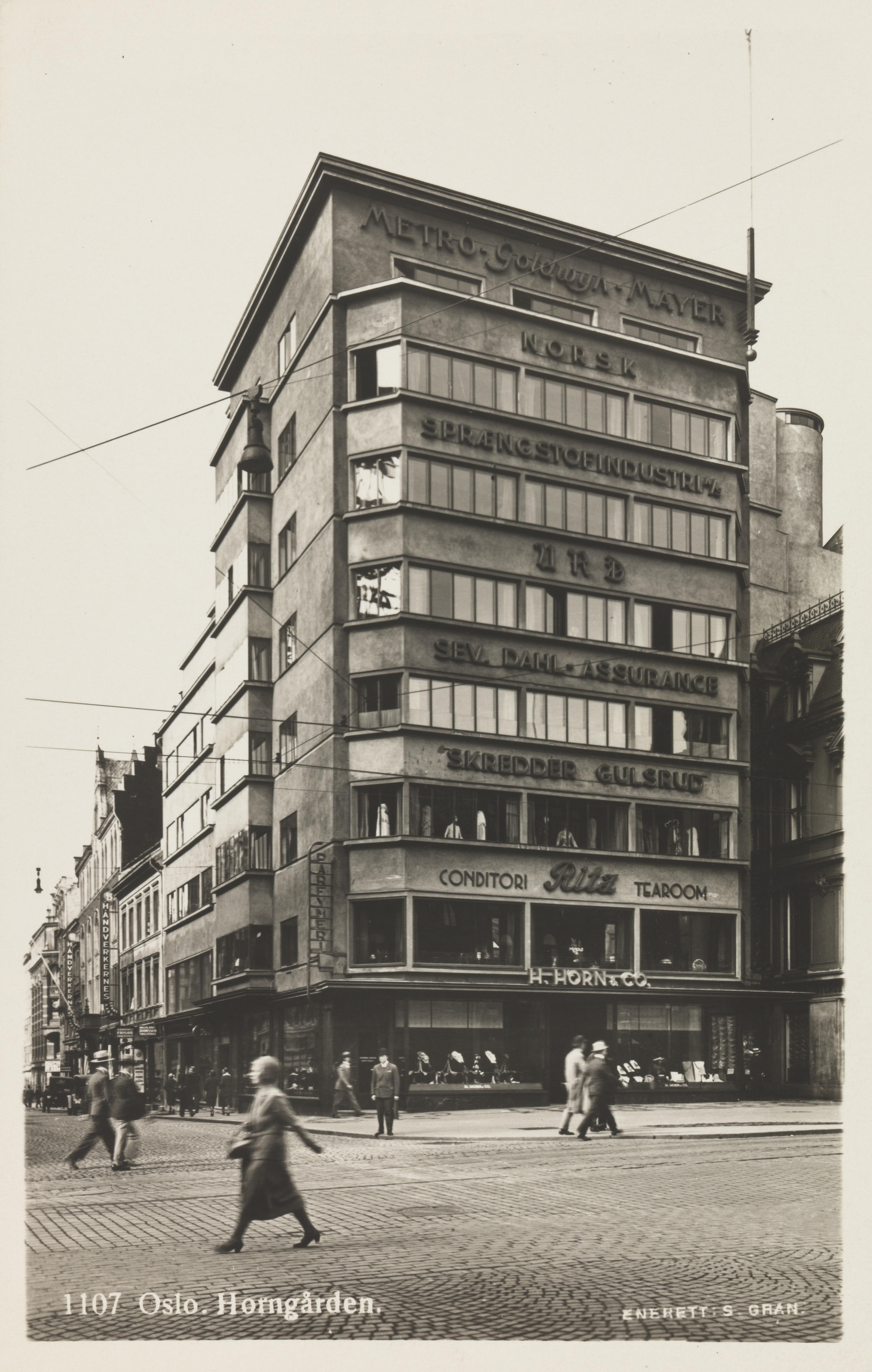 Bildet er hentet fra Nasjonalbibliotekets bildesamling Egertorget, Oslo, Oslo